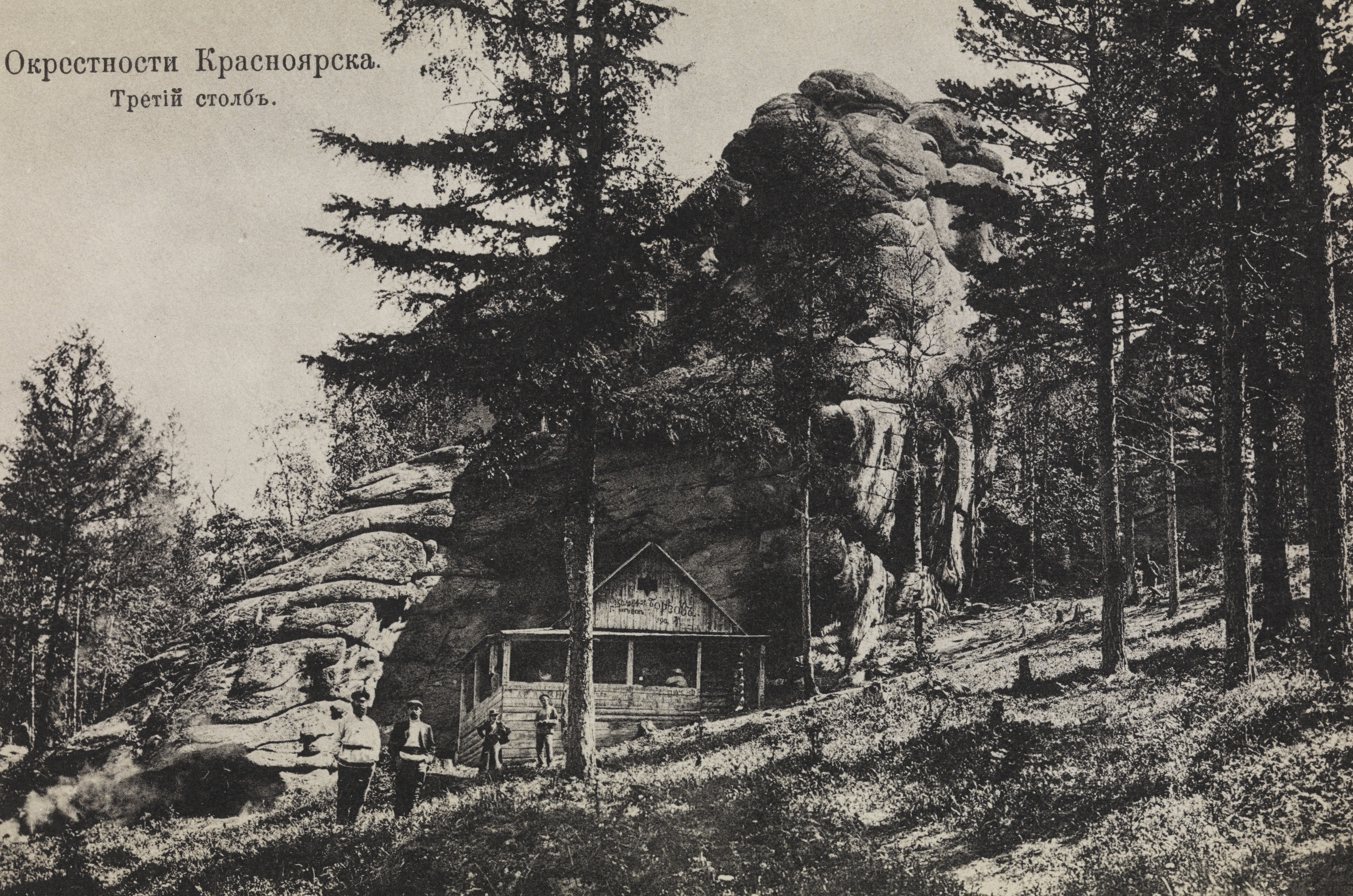 Skog med høye, rette trær. Disse ble hugget og brukt til stolper. (Langs jernbanen). Postkort. Ett av bildene fra reisen til Sibir i perioden 2. august - 26. oktober 1913. Fridtjof Nansen fortsatte sin transsibirske reise med den delvis nye jernbanen fra Krasnojarsk helt til Vladivostok. Depicted place: Russland, område ved Krasnojarsk